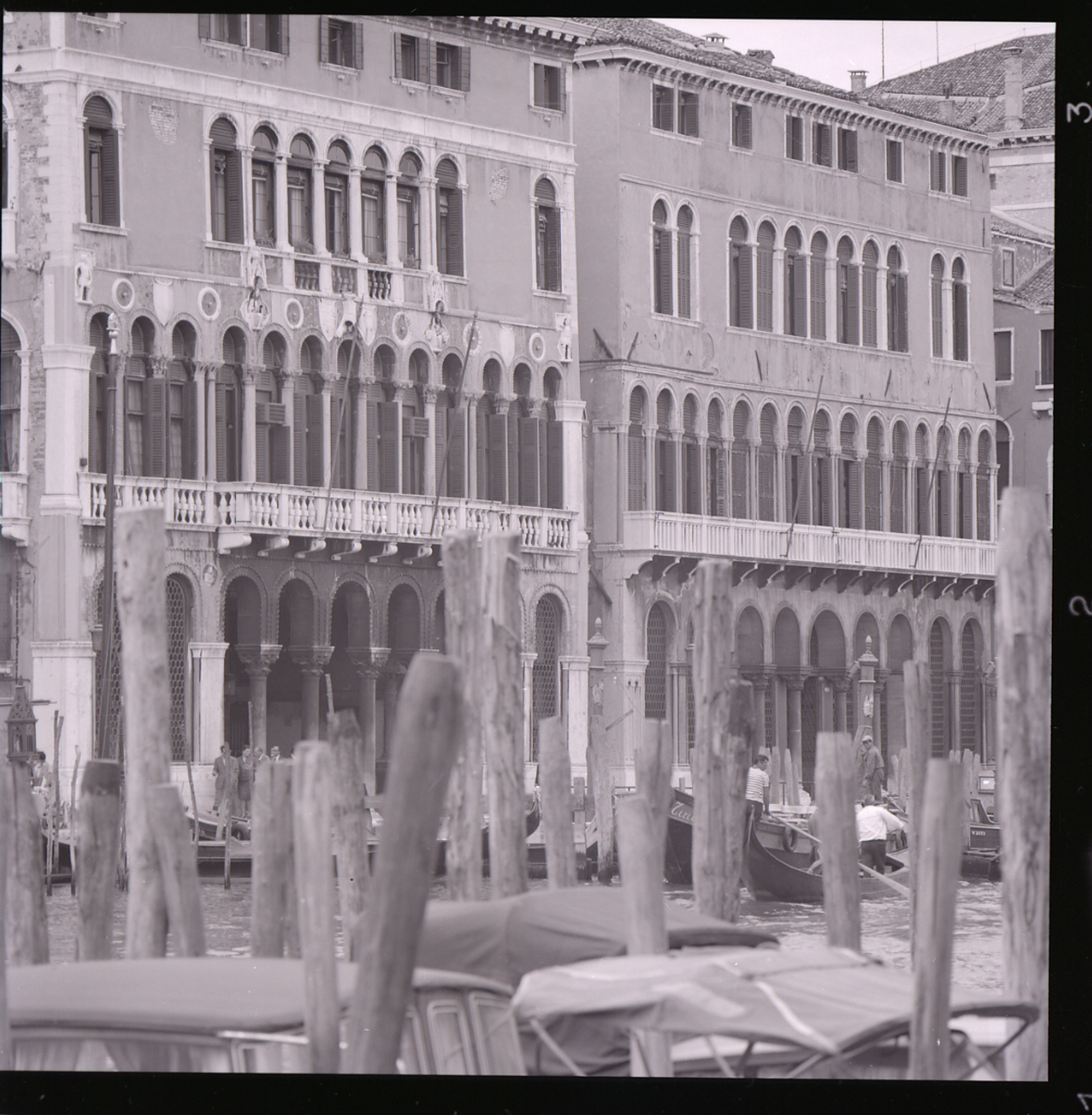 Servizio fotografico : Venezia, 1969 / Paolo Monti. - Buste: 1, Fototipi: 12 : Negativo b/n, gelatina bromuro d'argento/ pellicola ; 6x6. - ((Serie costituita da 1 contenitore portanegativi con 4 strisce di negativi identificabili con i nn.: 19579, 19580, 19581, 19582, 19583, 19584, 19585, 19586, 19587, 19588, 19589, 19590 (non è però possibile identificarli singolarmente non essendoci scritti i numeri in corrispondenza del singolo negativo). - Sul portanegativi: iscrizioni didascaliche e inventariali. - Occasione: Documentazione per la pubblicazione: Arslan Edoardo, "Venezia gotica: architettura civile gotica veneziana", Milano, Electa, 1970. - Fonte: Monografia di Arslan, Edoardo: Venezia gotica: architettura civile gotica veneziana, Milano, Electa (1970)